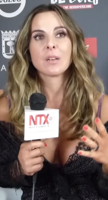 Deben actrices cuidar sus personajes para no caer en sexualización: Kate del Castillo